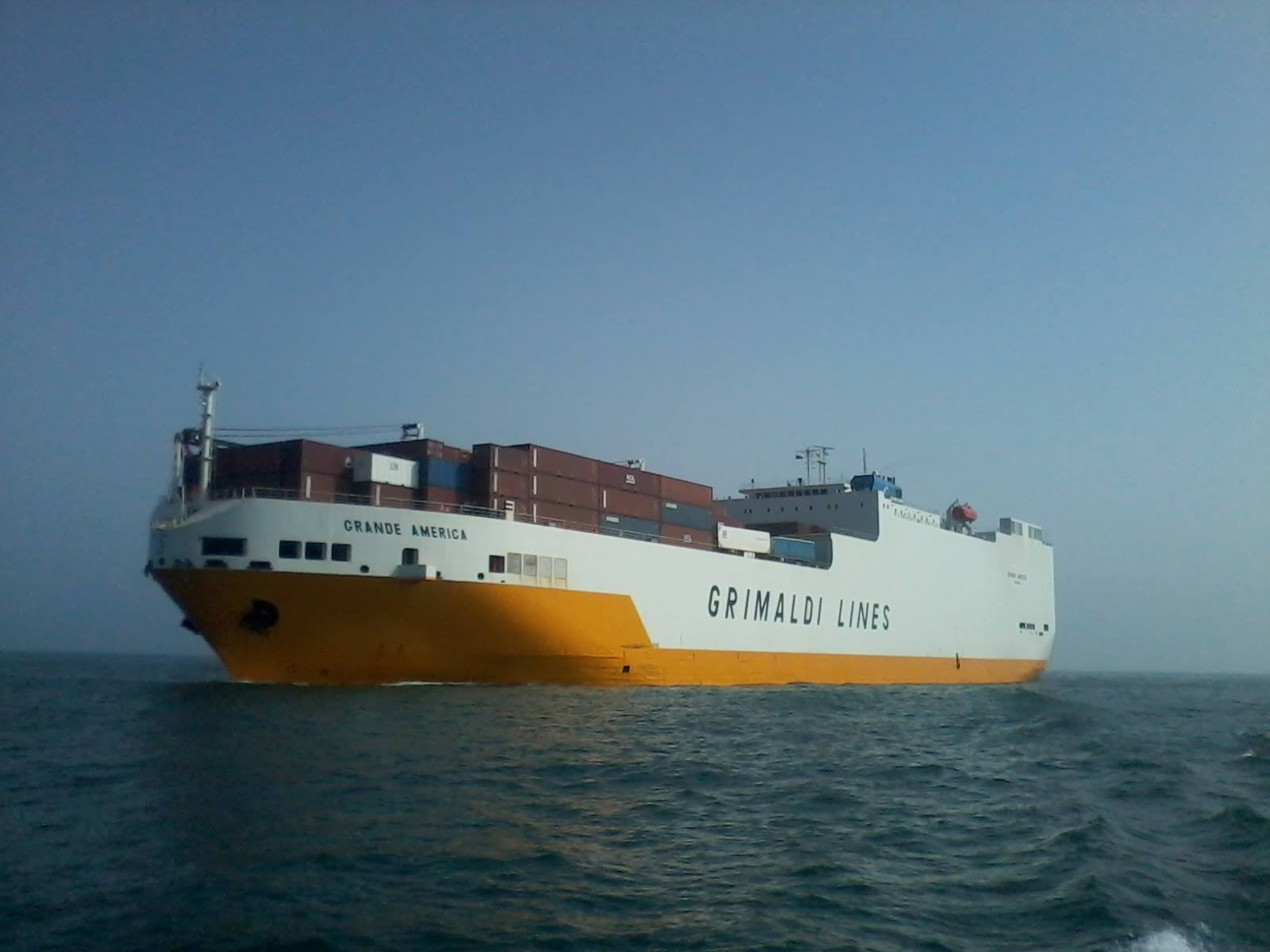 Carte postale car carrier GRANDE AMERICA en mer de Casablanca . Casablanca - Morocco - IMO: 9130937 Pavillon: Italy Genre d'un navire: Cargo Année de Construction: 1997